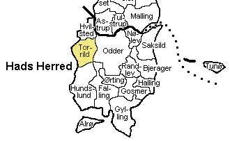 Kort der viser Torrild Sogn, Hads Herred, Århus Amt, Denmark.